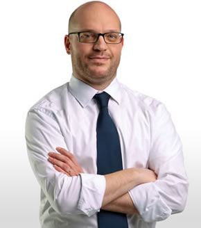 Ministro per la Famiglia e le Disabilità